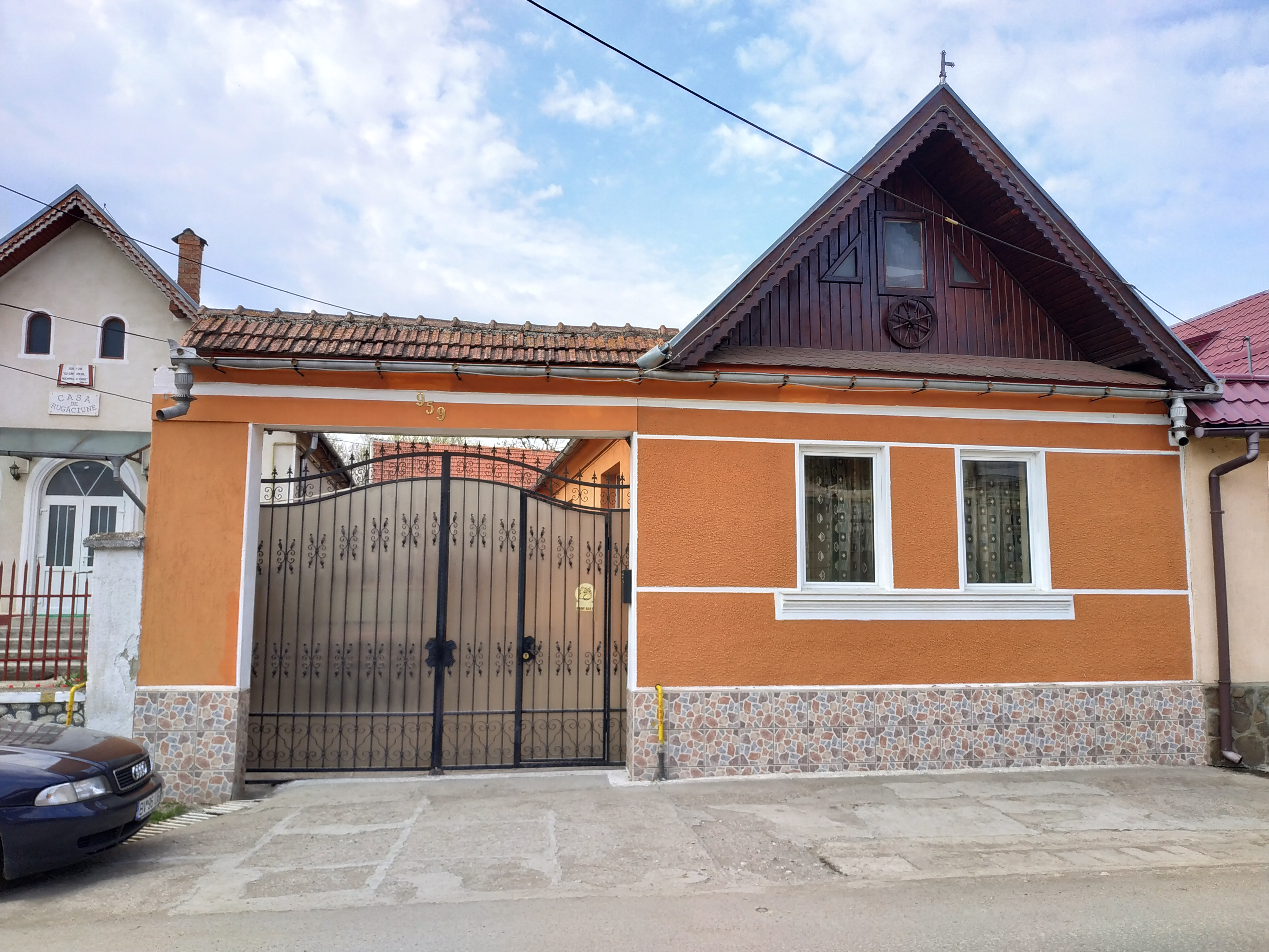 Moara veche